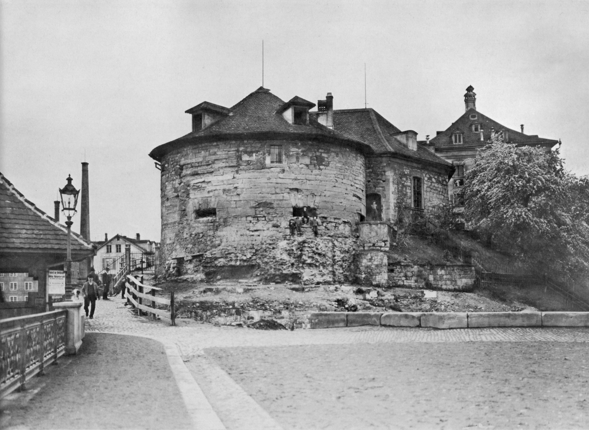 Das Oetenbachbollwerk aus dem 16. Jahrhundert am Bahnhofquai/Beatenplatz in Zürich um 1900. Links das "gedeckte Brüggli". Abgetragen 1903.